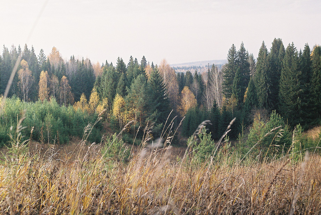 Лес в окрестностях деревни Пушкари, Якшур-Бодьинский район Удмуртии